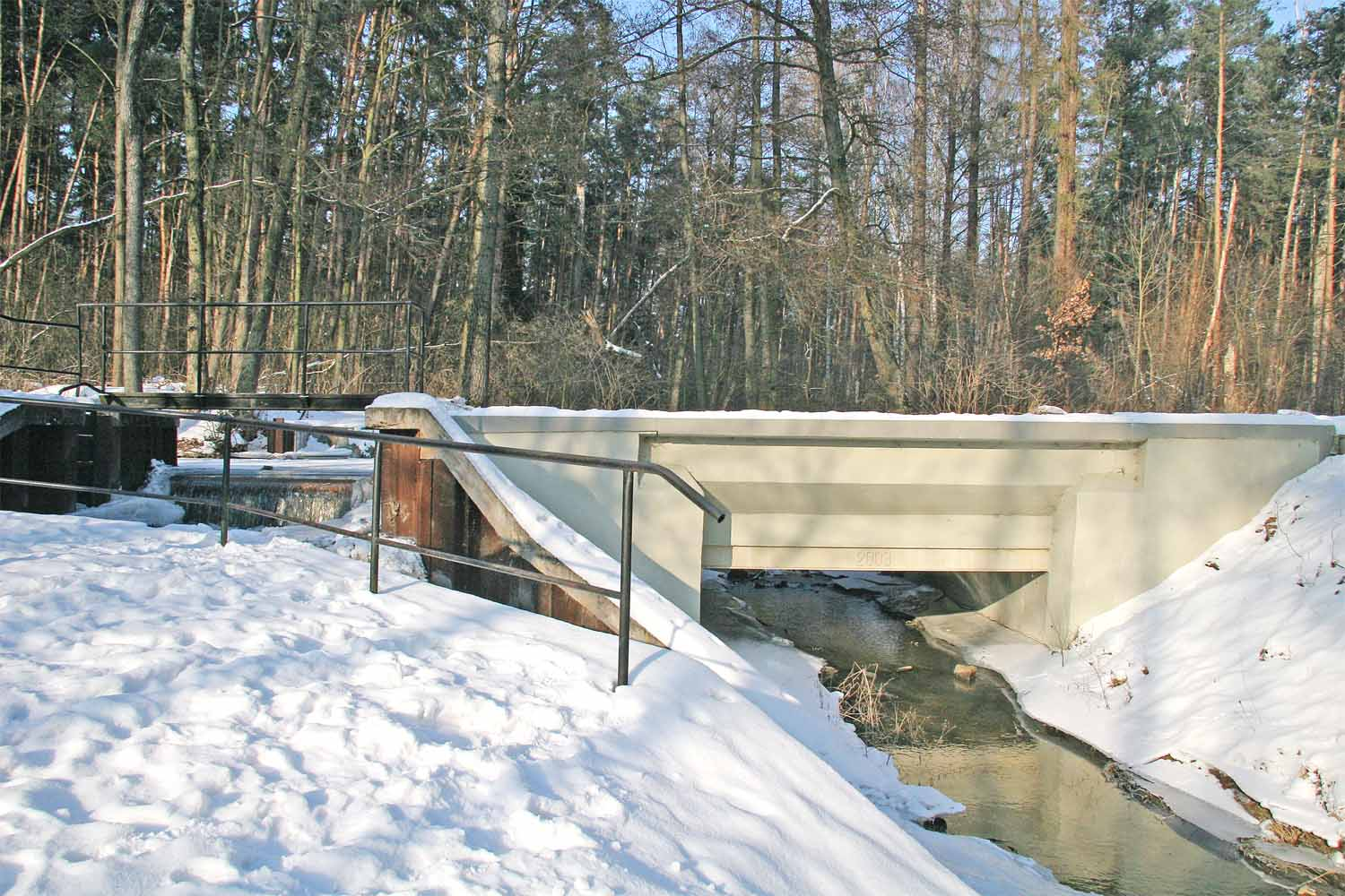 Semínský akvadukt.